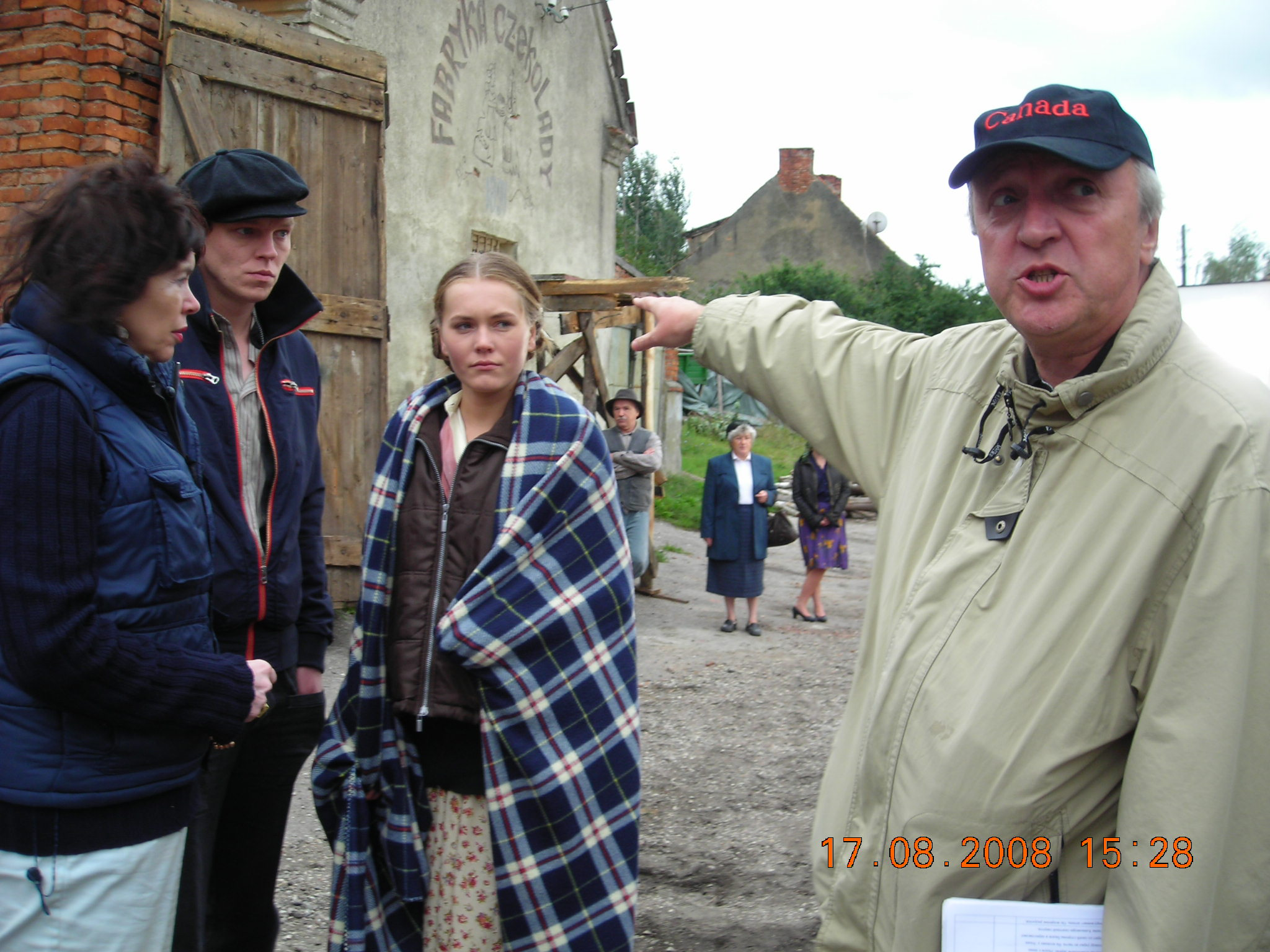 Валерий Пендраковский и Магдалена Лампарская на съемках фильма "Только не сейчас" 17.08.2008г. Калининградская область